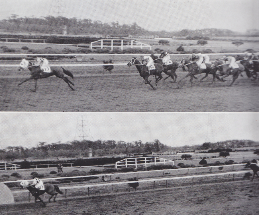 1954年皐月賞